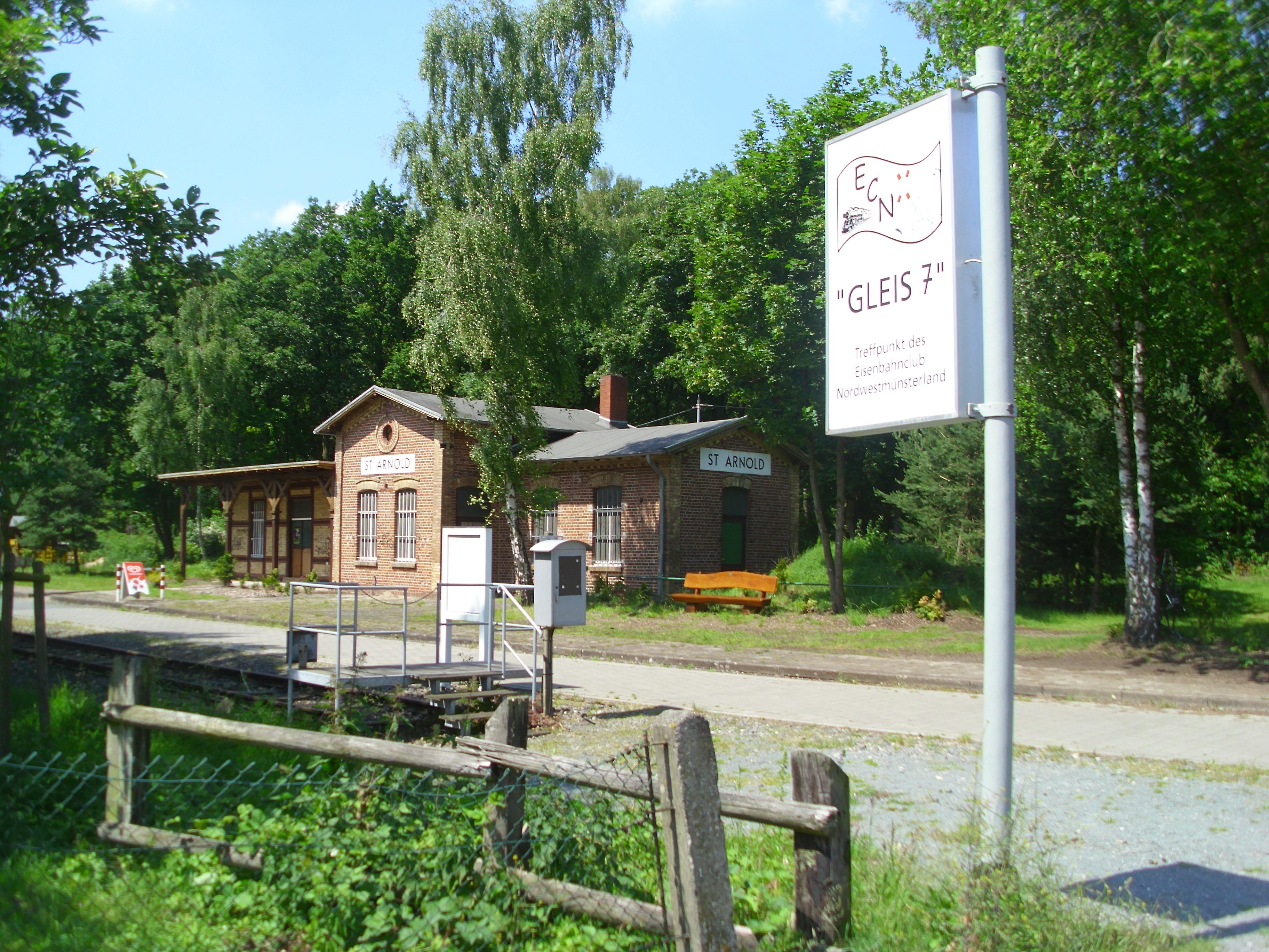 Ehemaliger Bahnhof St. Arnold an der Radbahn im Münsterland